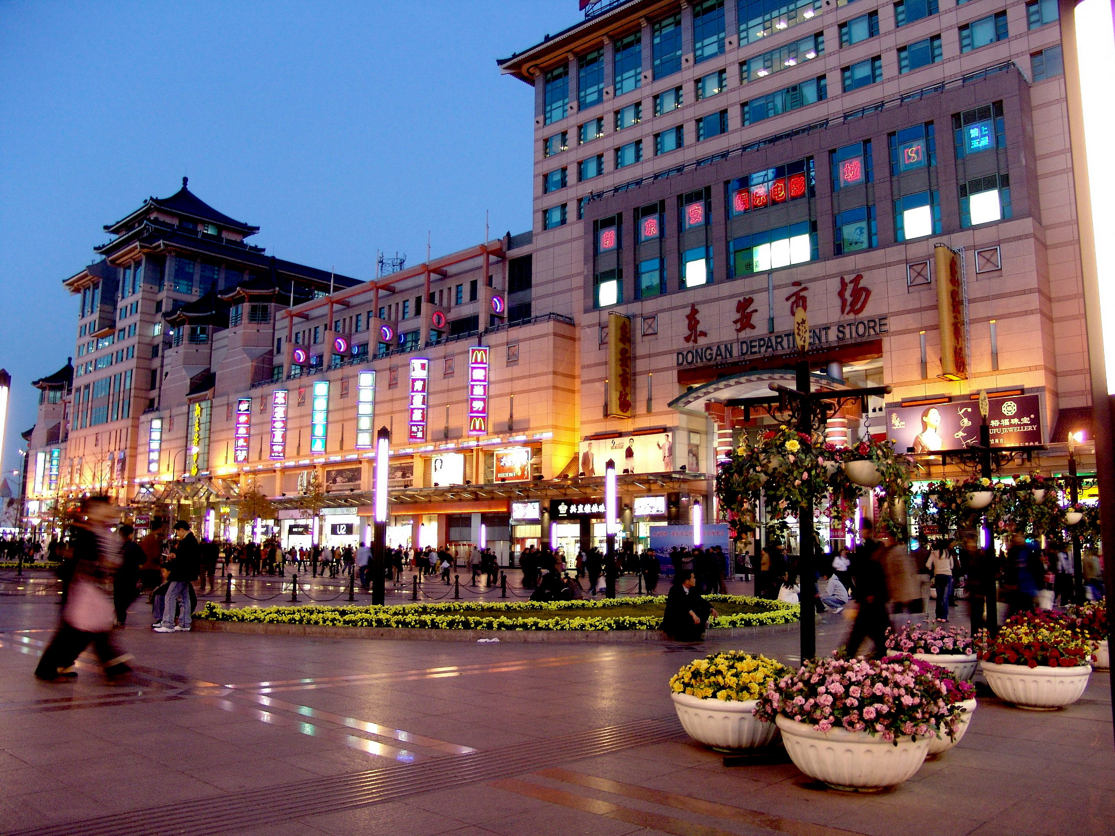 Wanfunjing Road